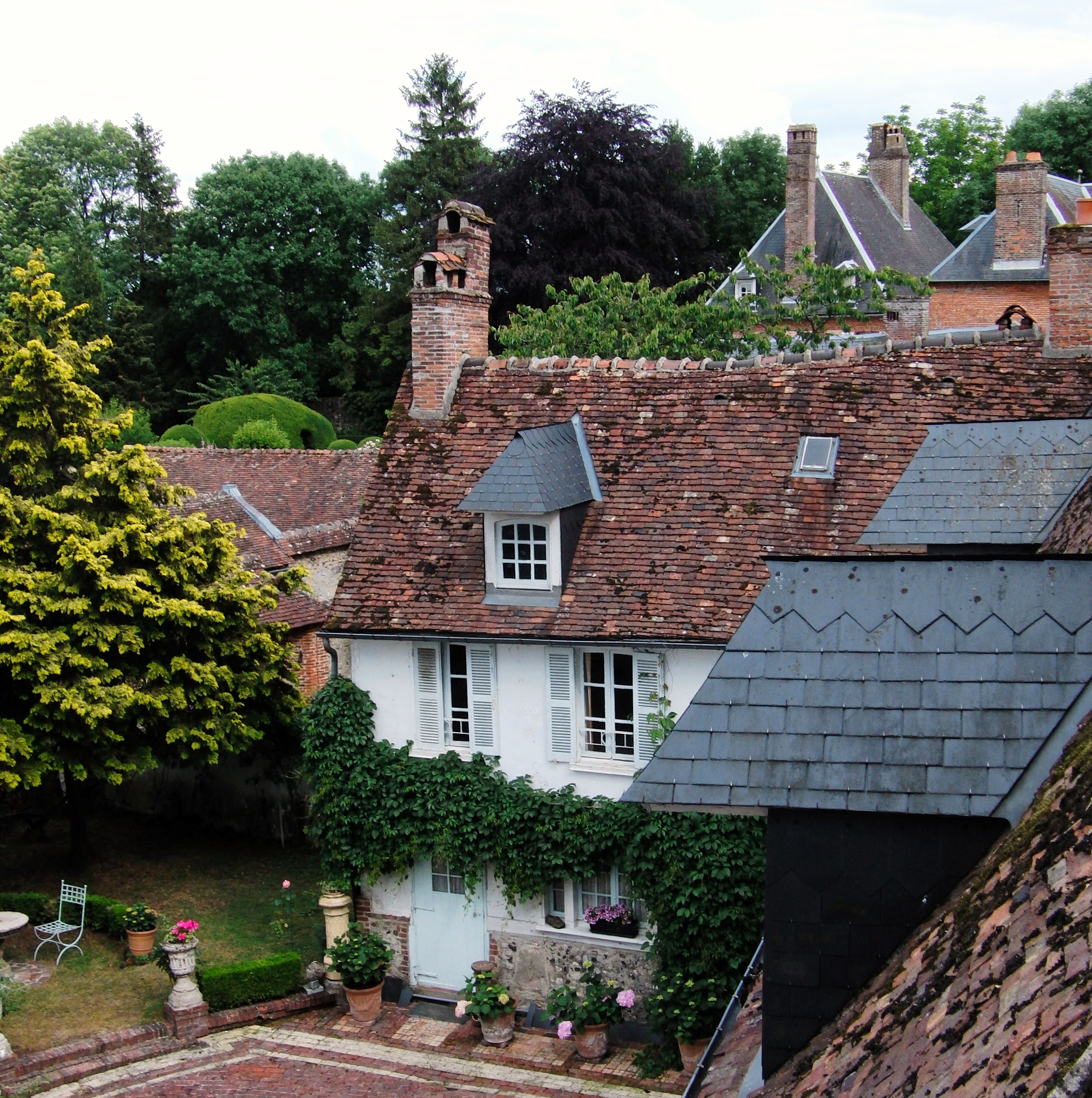 Lles jardins Henri Le Sidaner Gerberoy Picardie